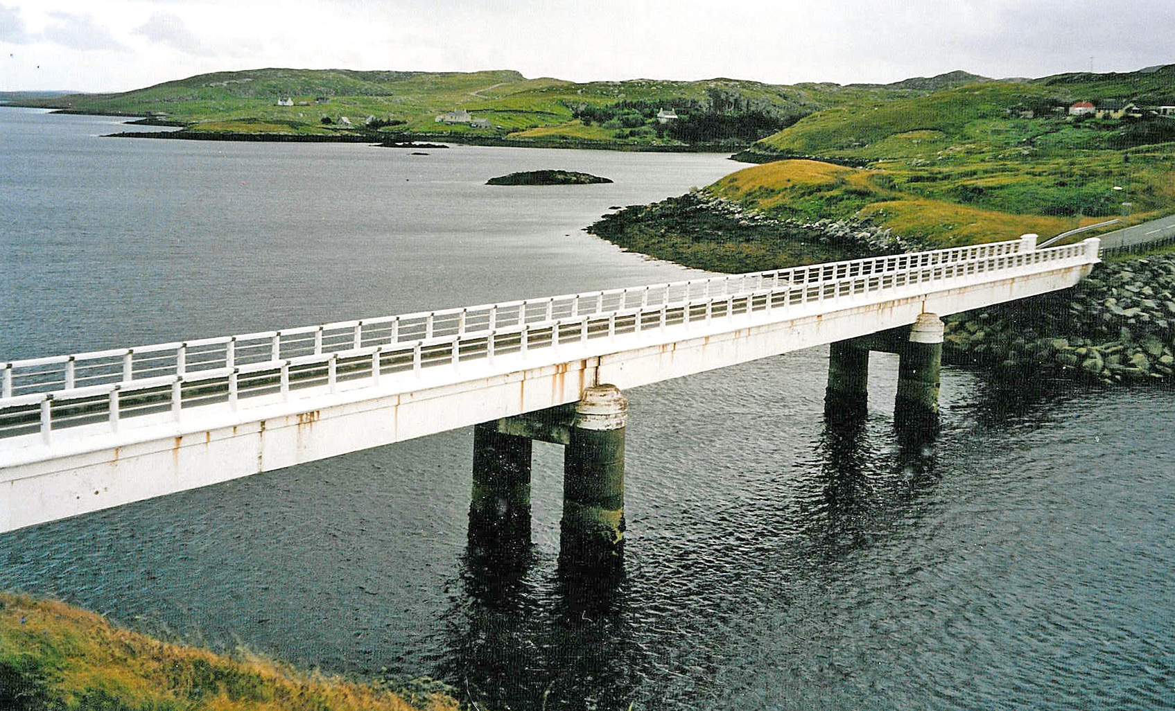 Bréck fir op d'Insel Lewis.